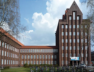 Tu braunschweig